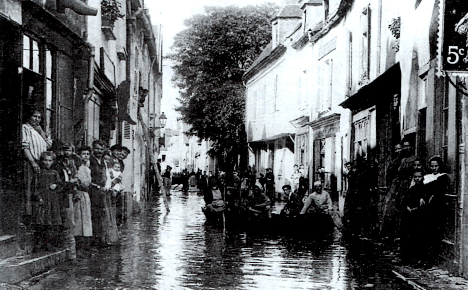 Crue de la Loire de 1907 - Commune de Gien, Loiret, France